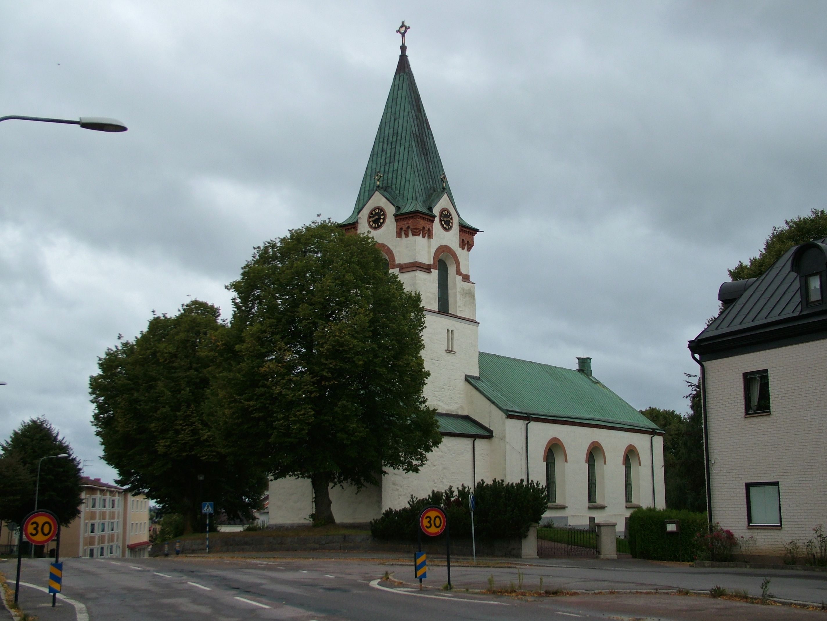 Schweden, Ödeshög, die Kirche